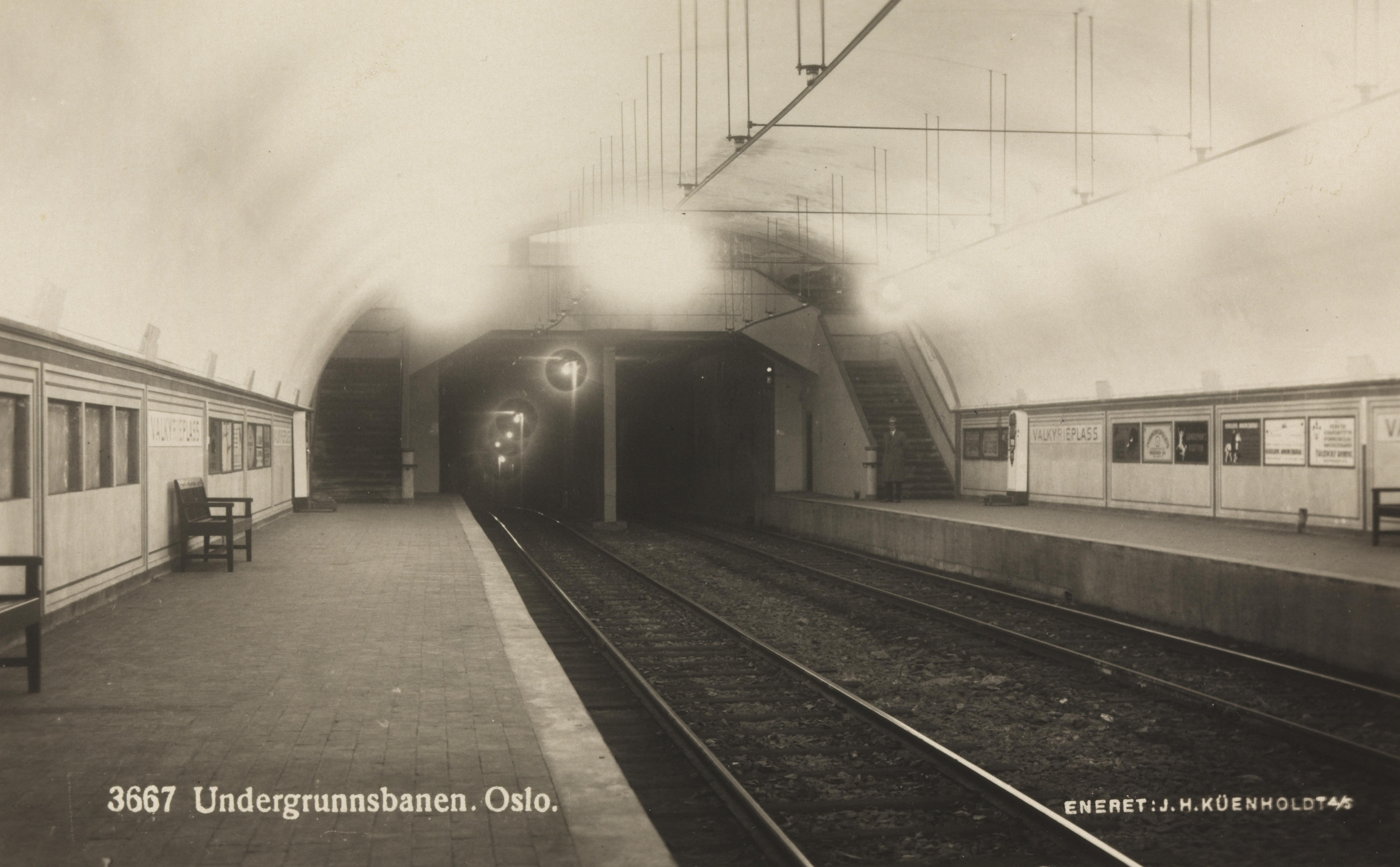 Bildet er hentet fra Nasjonalbibliotekets bildesamling Majorstua,Valkyrie plass stasjon, Oslo, Oslo